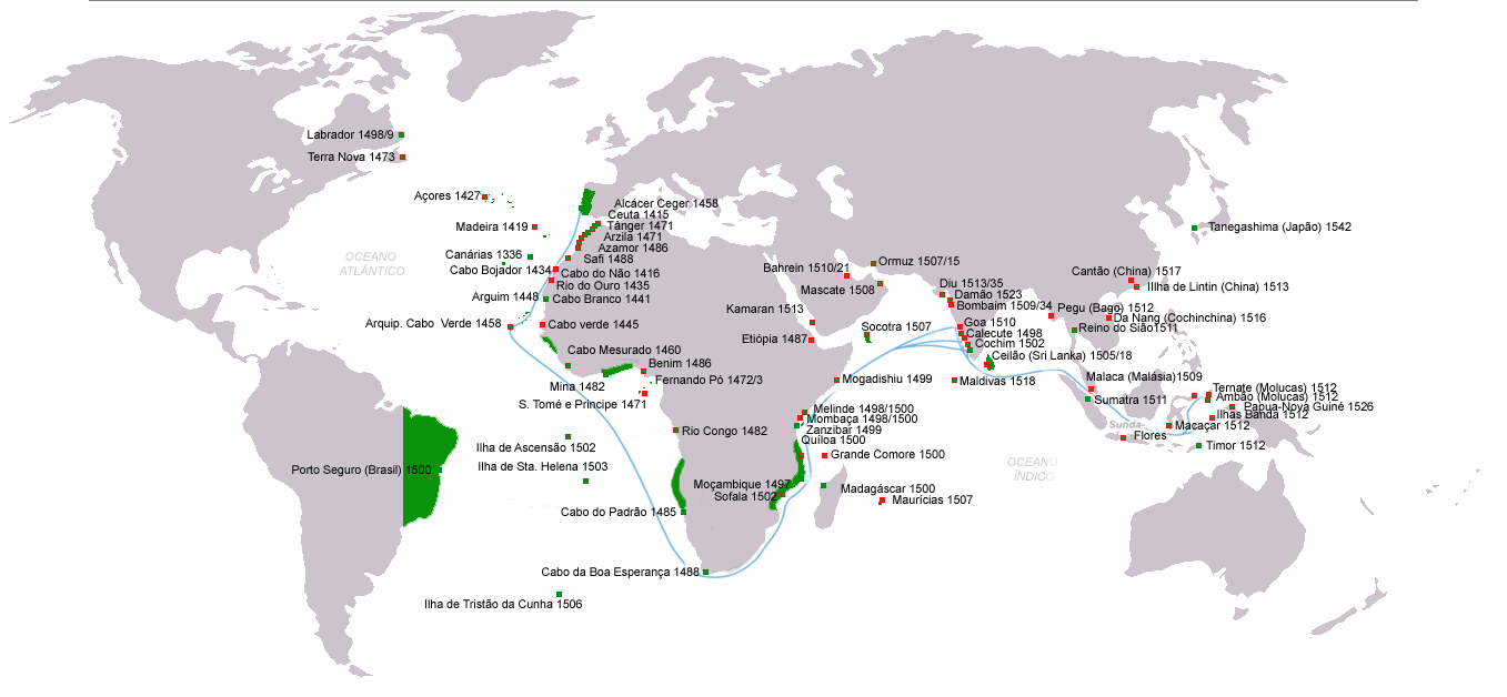 Mapa da exploração, primeiros contactos e conquistas portuguesas na Era dos Descobrimentos (desde a reivindicação das Ilhas Canárias de 1336 à chegada a Tanegashima em 1542/1543), com as datas de chegada indicadas; principais rotas marítimas no Oceano Índico (azul); territórios reivindicados no reinado de D.João III de Portugal c.1536 (verde); versão portuguesa